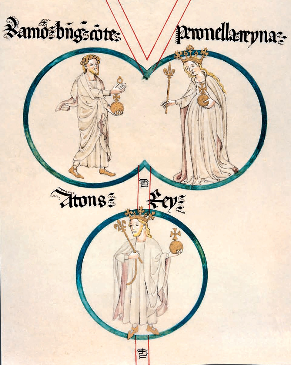 Genealogía de los Reyes de Aragón o Rollo de Poblet. Manuscrito sobre pergamino. Inscripciones: “(izquierda) Ramo(n) B(ere)ng(er) : co(n)te (espacio) (derecha) Peronella : reyna /(abajo) Alfons : rey”. Petronila aparece con corona, manto, cetro y pomo, atributos de la realeza. Ramón Berenguer, con anillo que simboliza el enlace. Fuente: Ernest Belenguer y Felipe Vicente Garin (eds. lits.), La Corona de Aragón, siglos XII-XVIII, Madrid, Sociedad Estatal para la Acción Cultural Exterior, 2006. ISBN 978-84-96008-81-6.